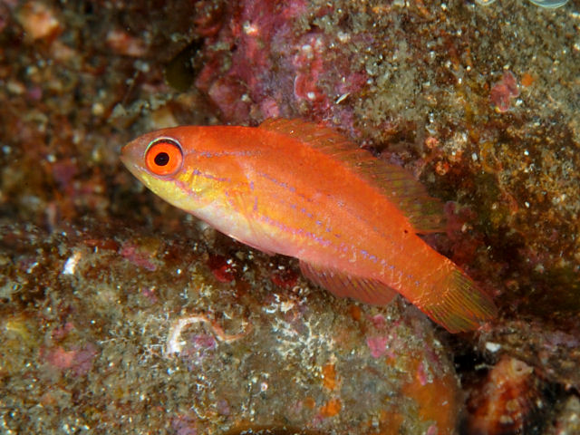 クジャクベラ Paracheilinus carpenteri